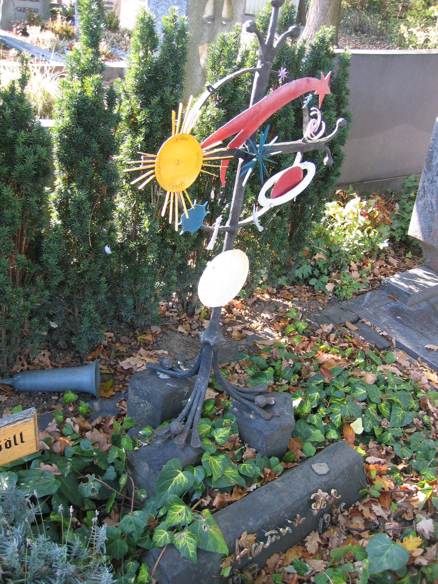 Grabkreuz von Heinrich Böll auf dem alten Bergfriedhof in Bornheim-Merten